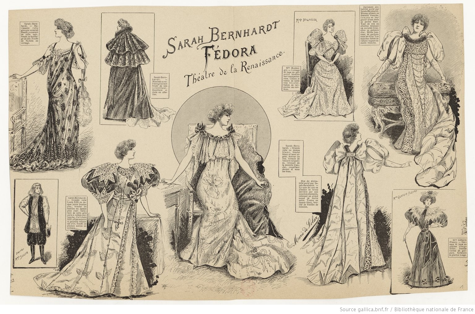 Costumes de Sarah Bernhardt pour Fédora, drame de Victorien Sardou, Théâtre de la Renaissance, 3 avril 1894, gravure de Marie de Solar